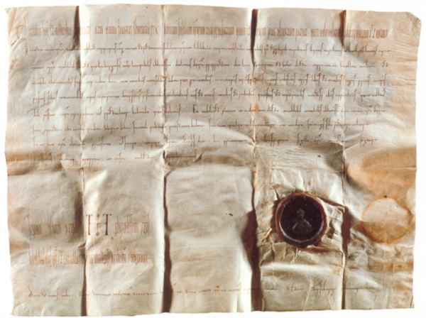 Die Schenkungsurkunde von Potsdam im Jahr 993 durch Kaiser Otto III. Auszug: "zwei Plätze, Poztupimi (=Potsdam) und Geliti (=Geltow) genannt, gelegen in der Hevellon geheißenen Provinz und auf der Insel Chotiemnizles gelegen (lat. […] duo loca poztupimi et Geliti dicta in provincia Hevellon Vocata et in insula Chotiemnizles sita […]). Textquelle: Originaltext der Urkunde mit Übersetzung (PDF; 32KB), Landeshauptstadt Potsdam, abgerufen am 25.11.2015